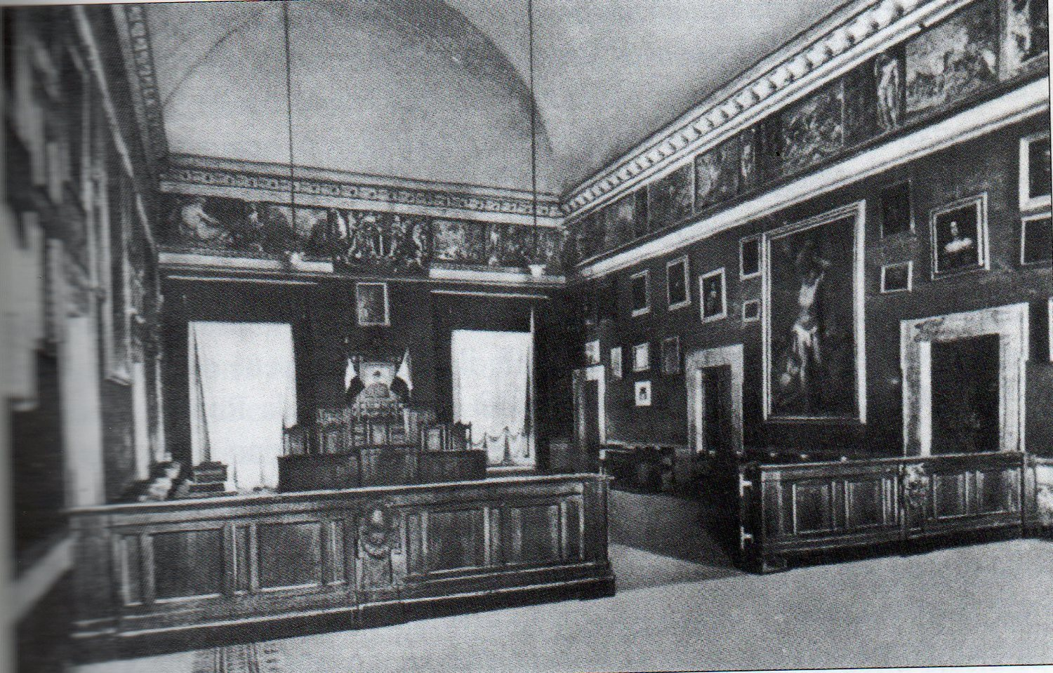 La quadreria dei fratelli Zuccari nella Sala Ducale di Palazzo Colonna a Marino (RM) prima del bombardamento, anni '20